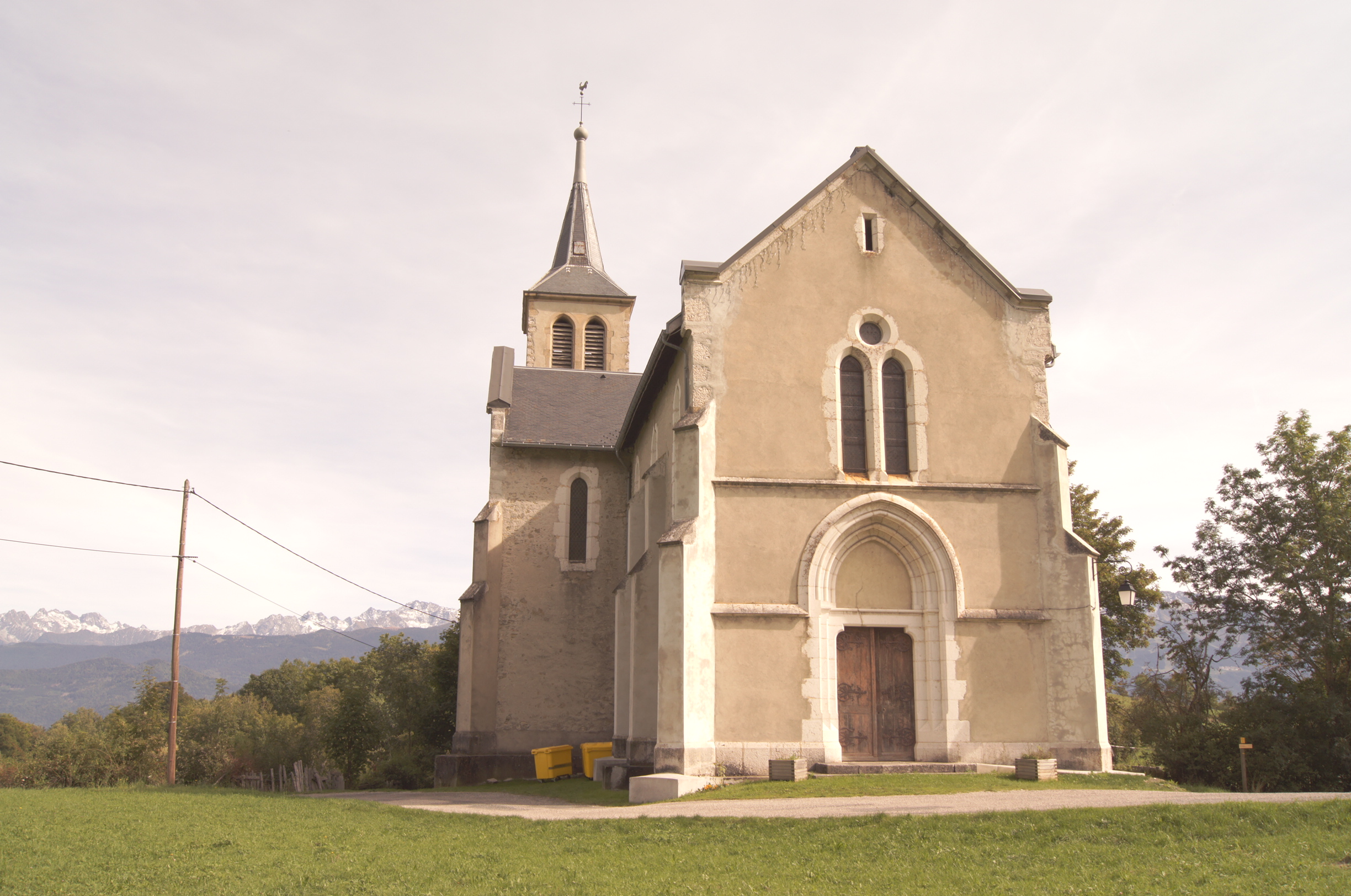 L'église